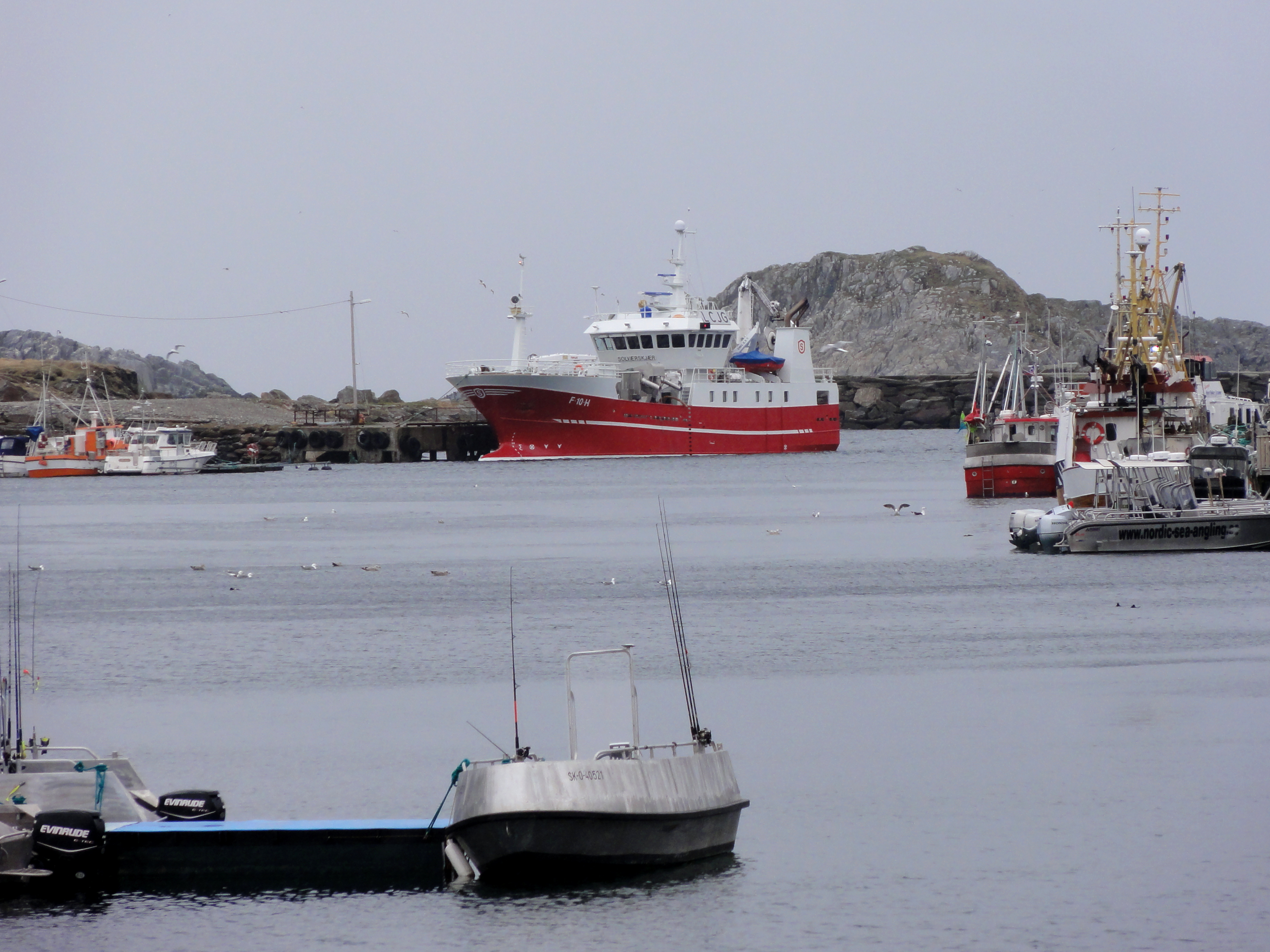 Prístav, Sørvær, Sørøya, Nórsko, 2015